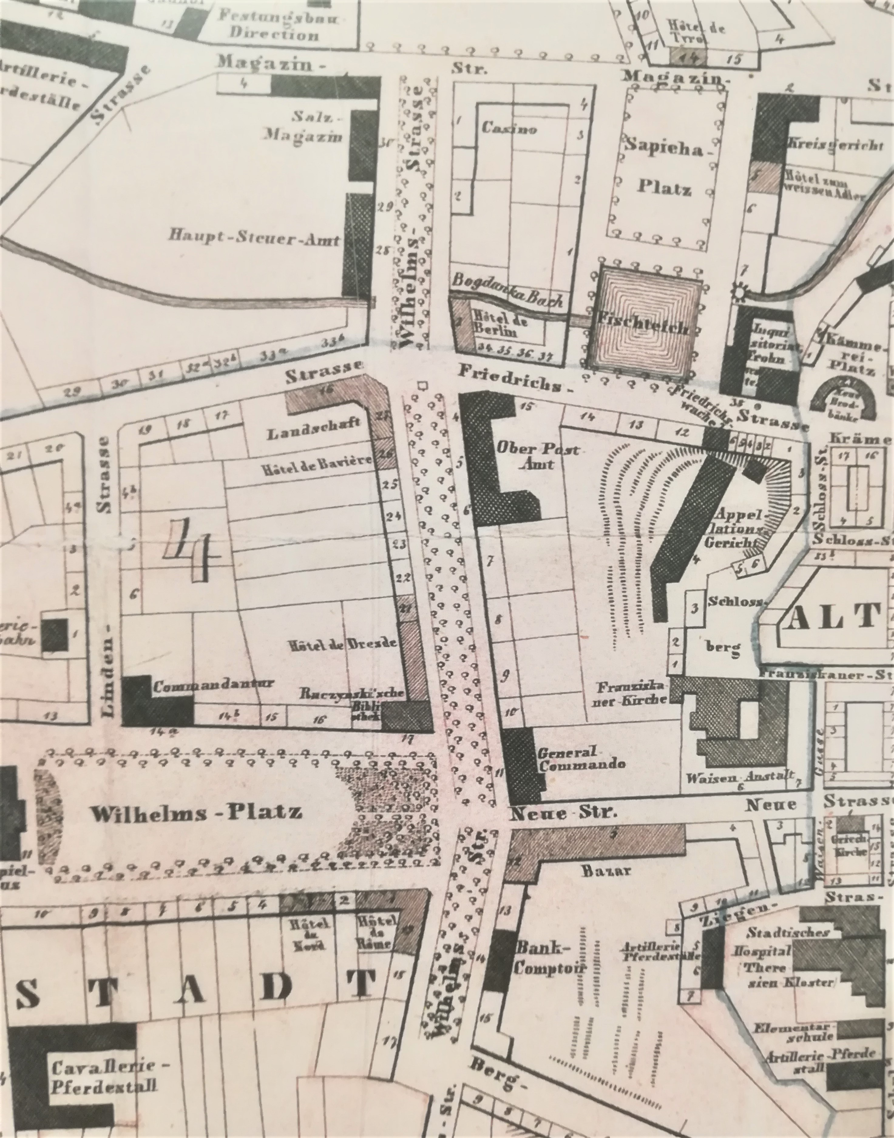 Aleje Marcinkowskiego w 1856 r. Poznań, mapa Corvinusa.